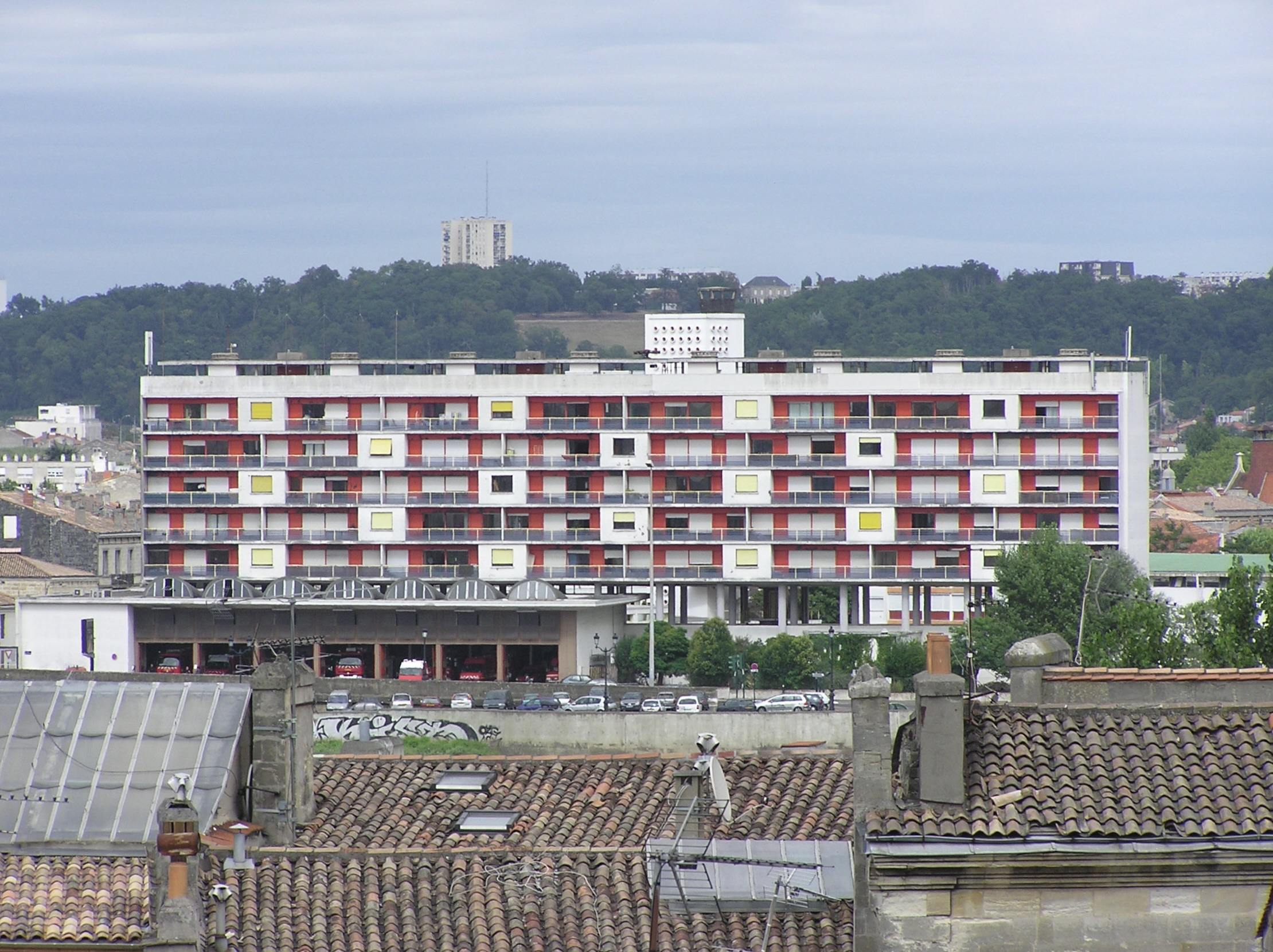 La caserne des pompiers de la Benauge à Bordeaux a été construite de 1952 à 1954.